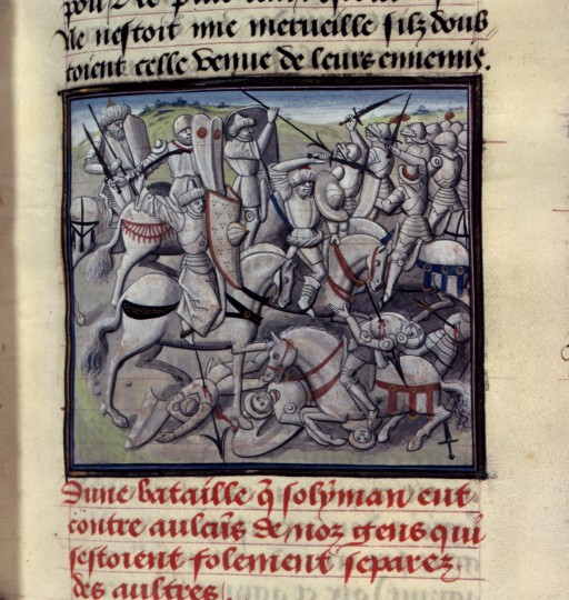 Bataille de Dorylée (1097)